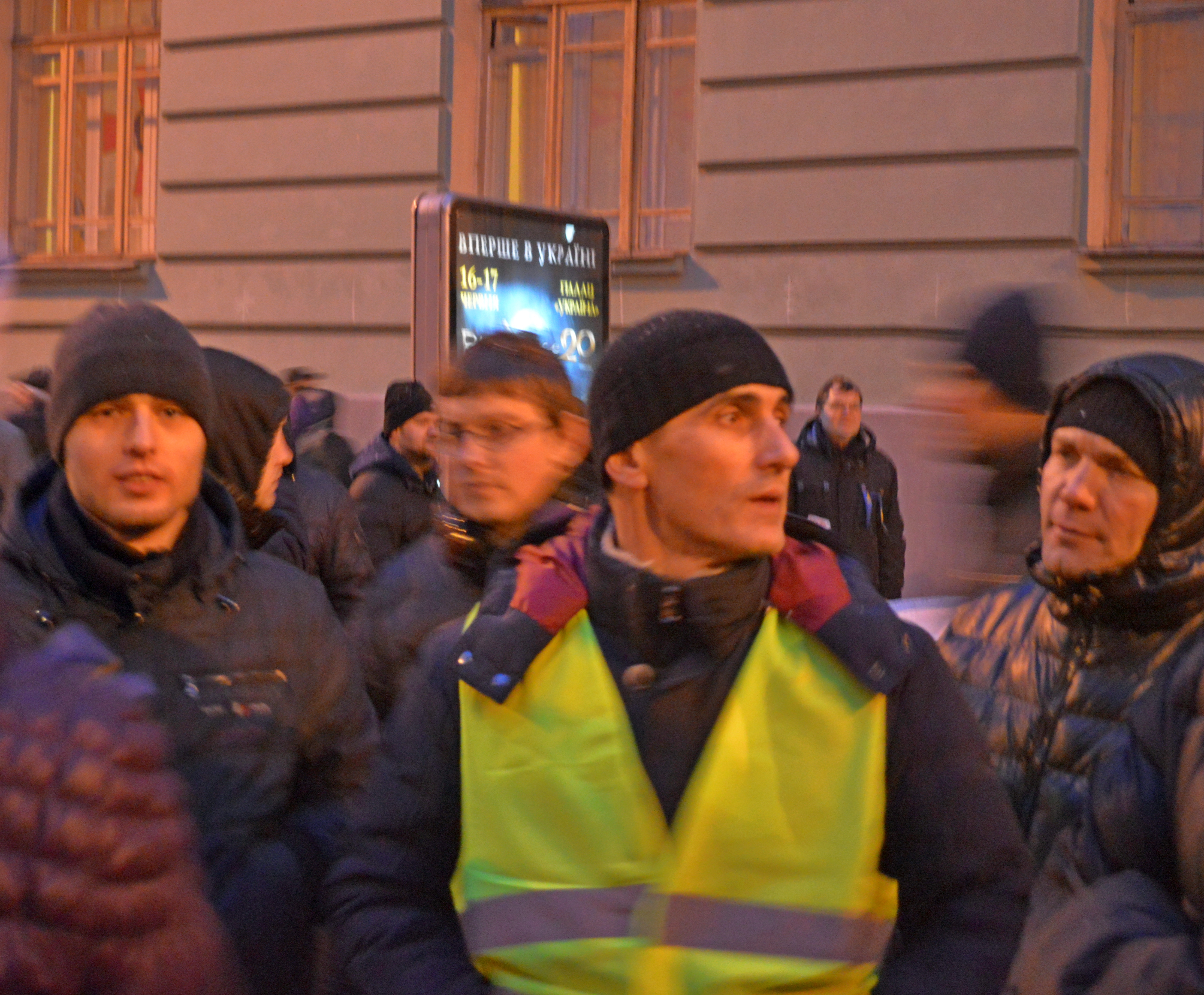 Фото зроблено у грудні 2013 року.